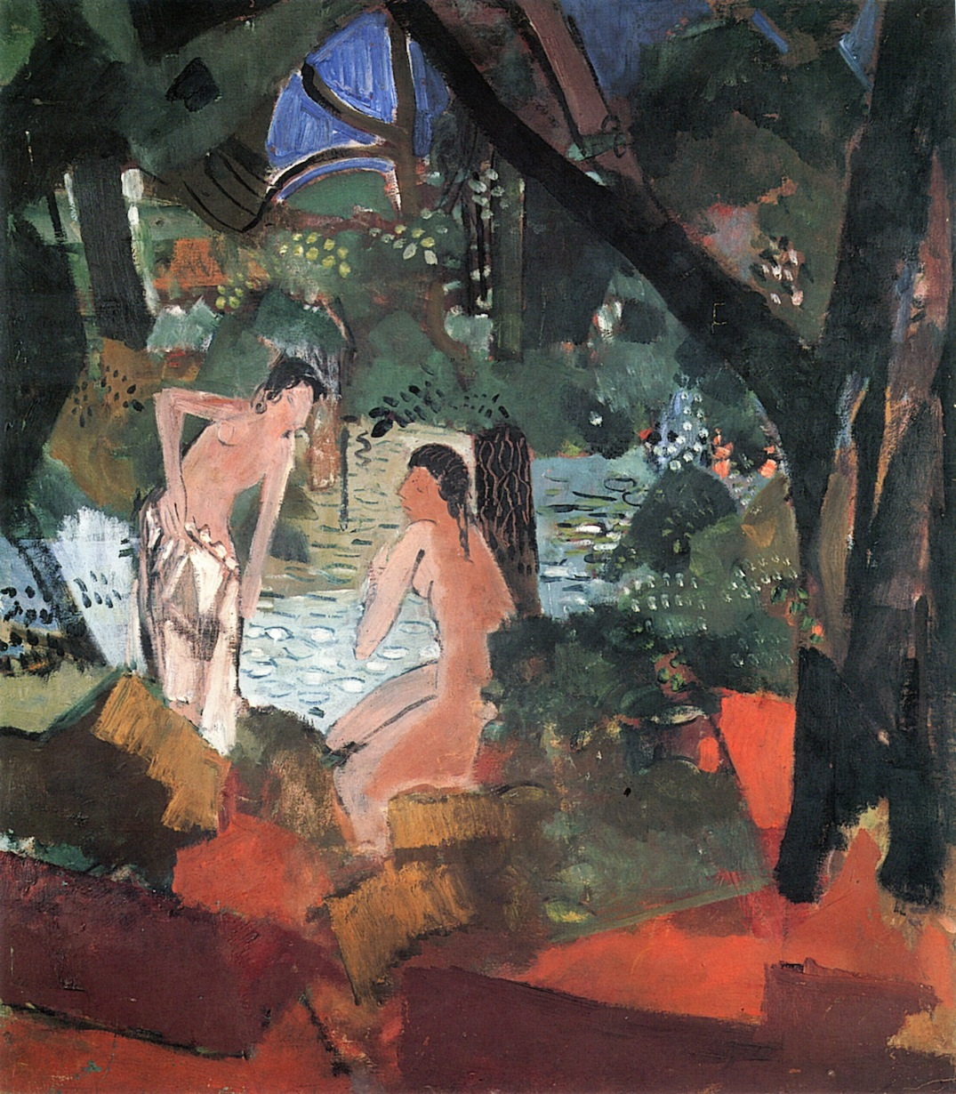 картины немецкого художника-постимпрессиониста Оскара Молля